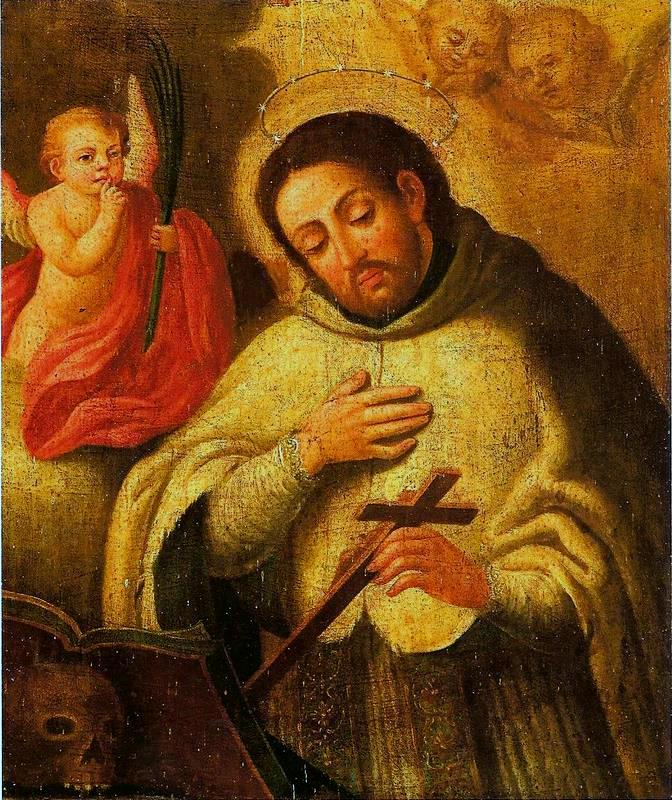 São João Nepomuceno, óleo sobre madeira (século XVIII, Salvador, BA). Acervo do Museu Afro Brasil